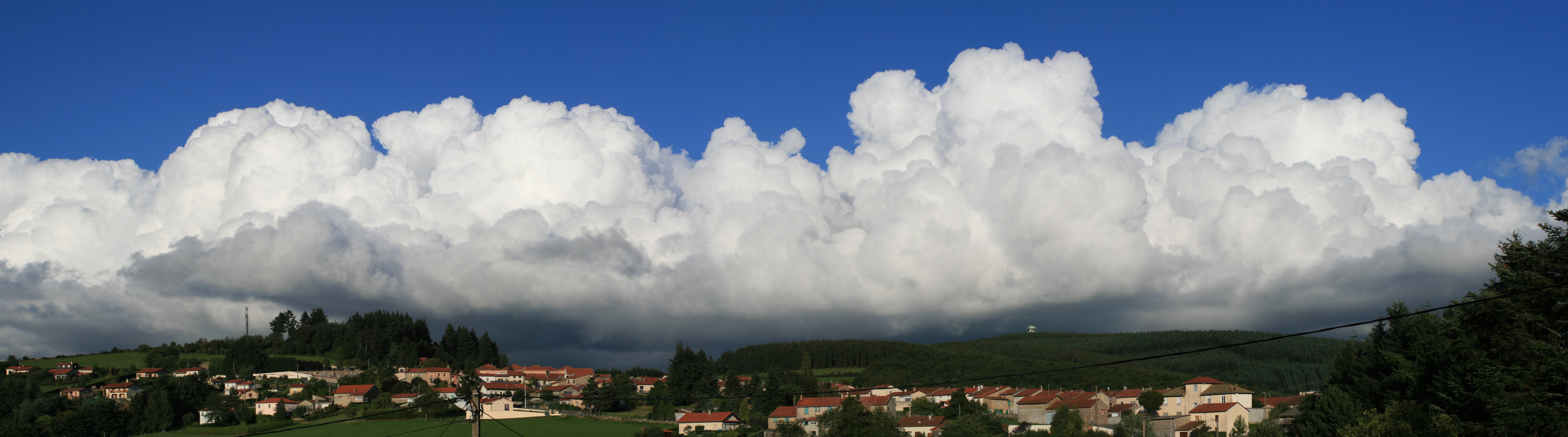 Panorama Mont Boussuivre Violay orage